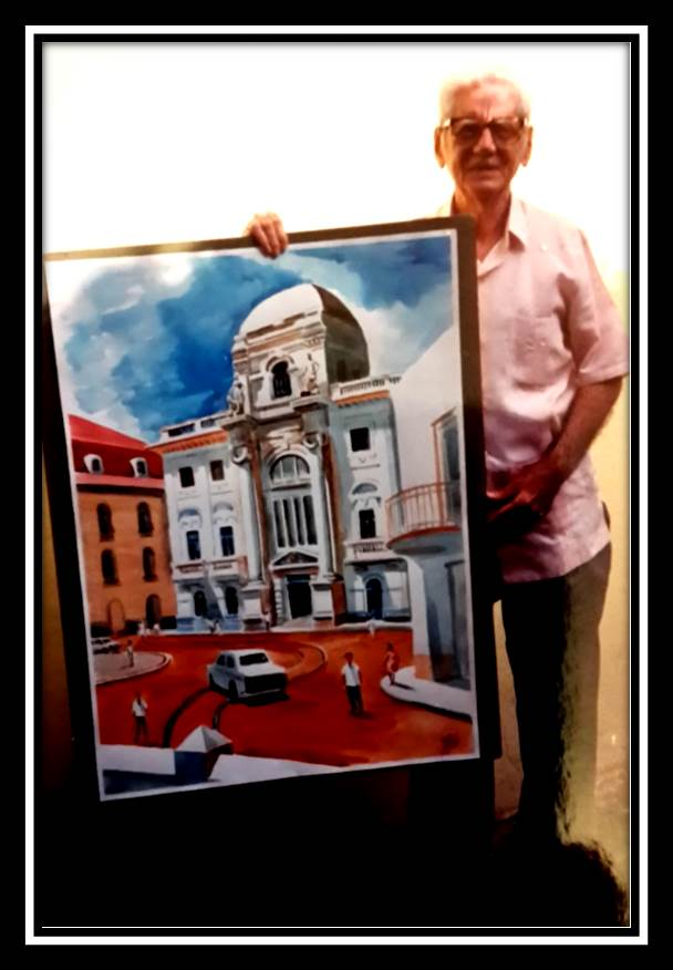 Rodolfo A. Méndez Vargas, muestra su obra Palacio Municipal de Panamá